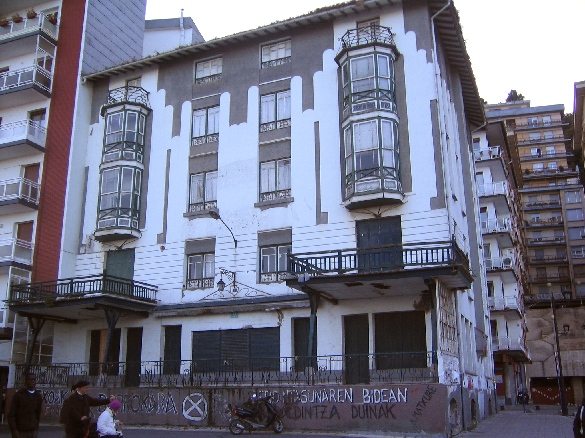 Edificio del Hotel Vega en la localidad de Ondarroa en Vizcaya (País vasco, España)